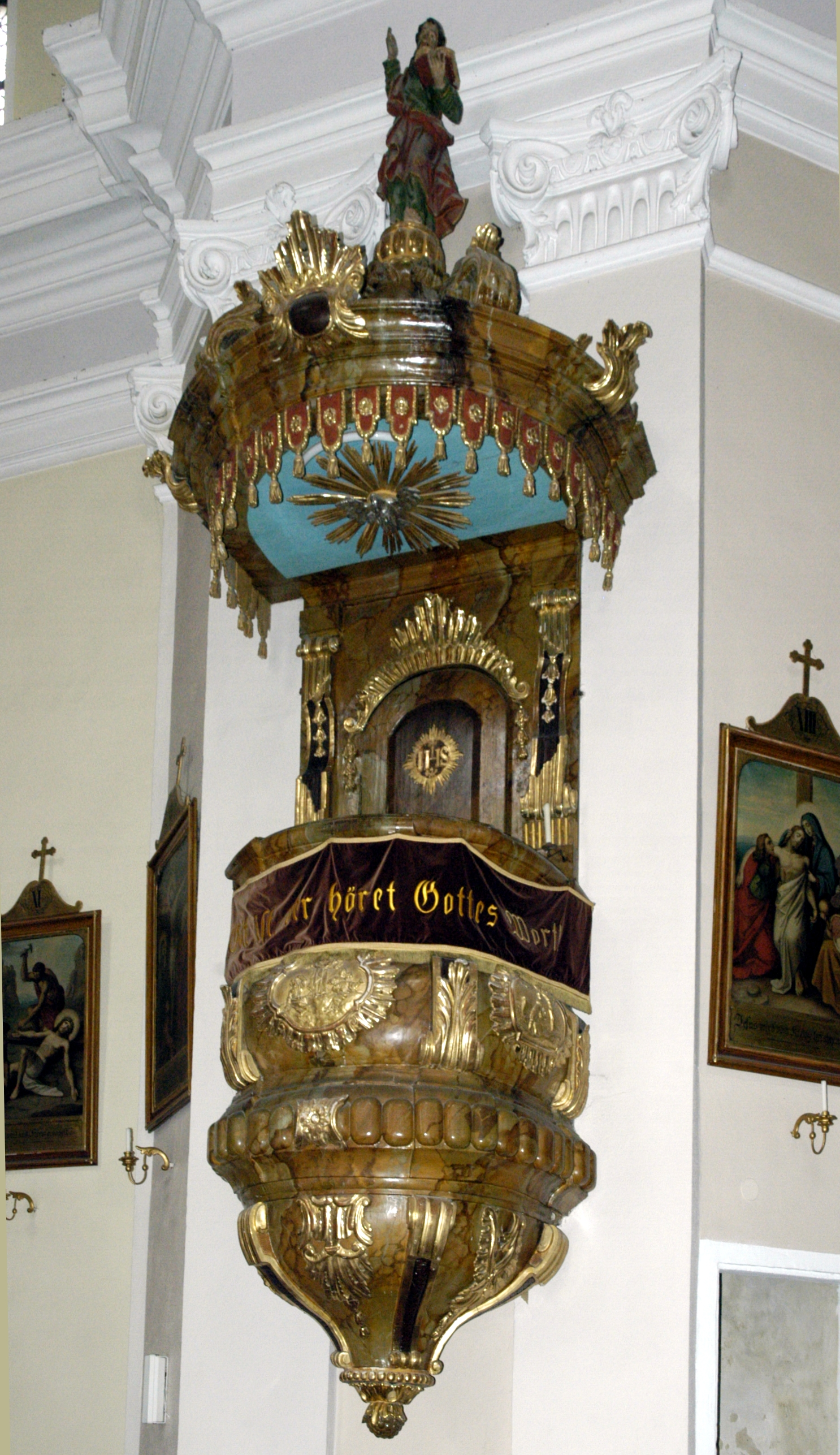 katholische Pfarrkirche heiliger Georg in Aspersdorf, Gemeinde Hollabrunn - Kanzel